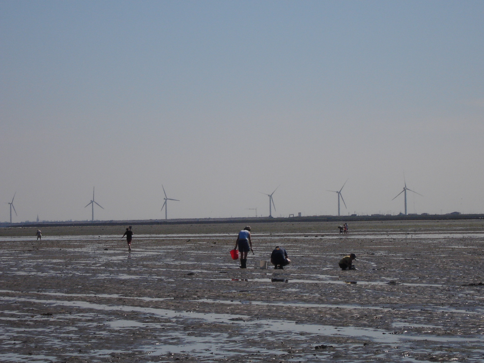 France, Vendée (85), Passage du Gois et les éoliennes de Bouin